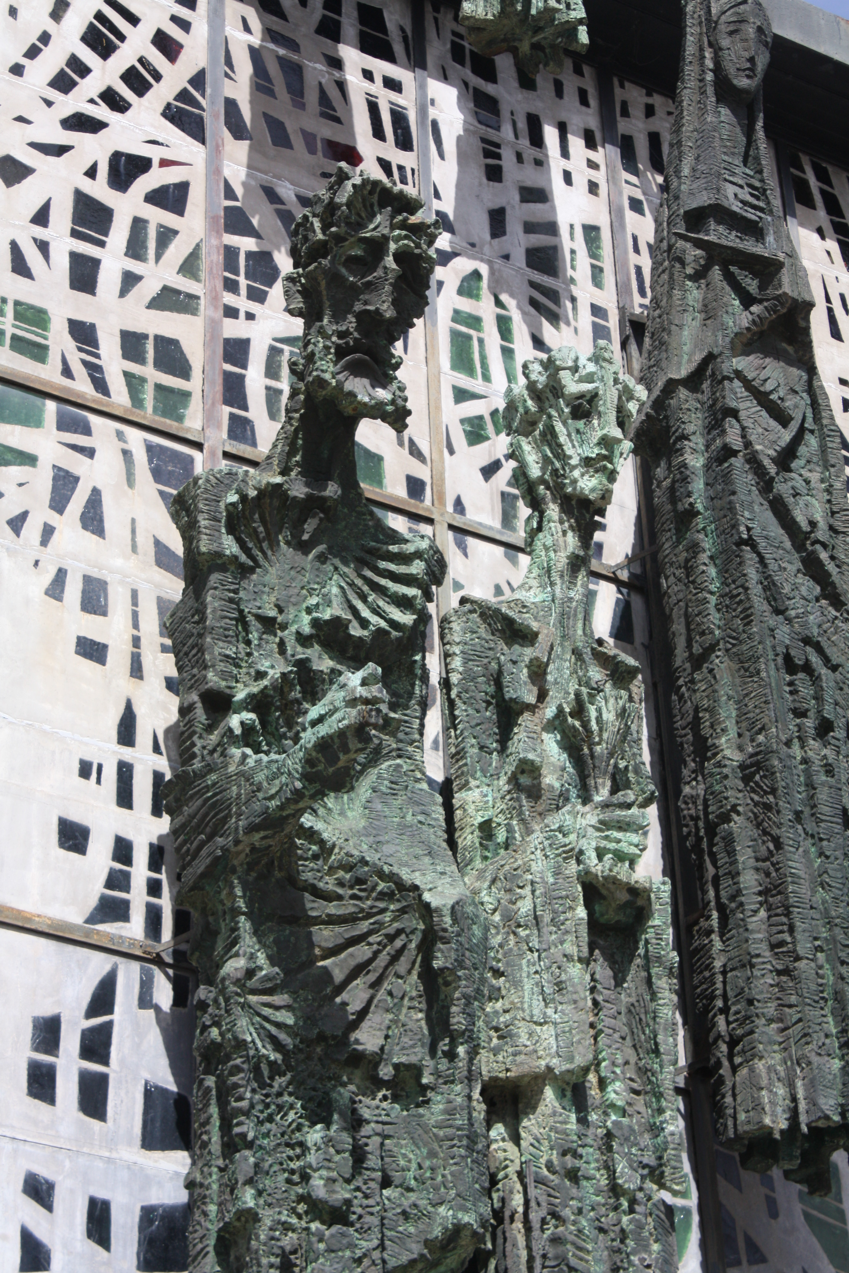 Estatuas dos apóstolos Santiago (co corpo cuberto de cunchas de vieira) e Xoán, na fachada da Basilica de La Virgen del Camino (León), obra de Josep María Subirachs (1961)